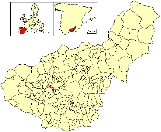 Situación de la localidad de Ambroz (en el municipio de Vegas del Genil) respecto a la provincia de Granada, en España.